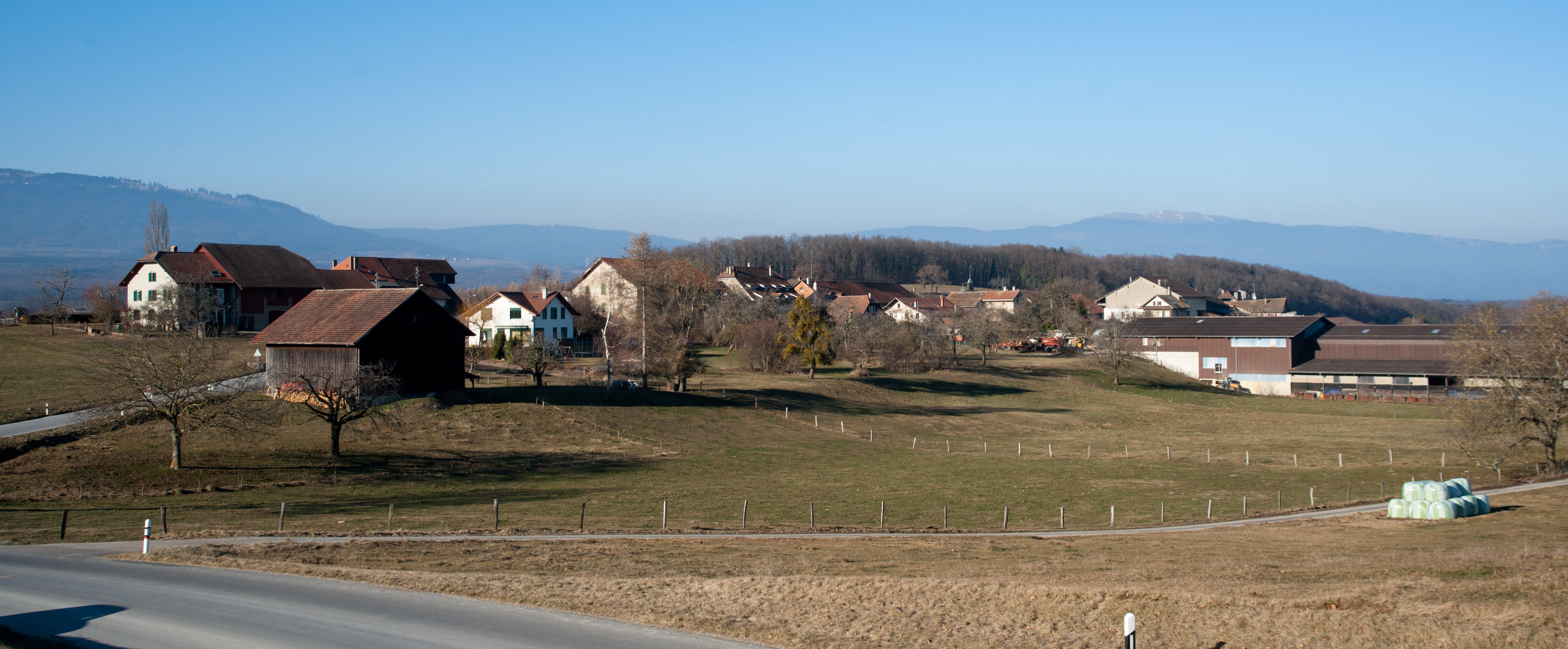 Dizy, canton de Vaud, Suisse.